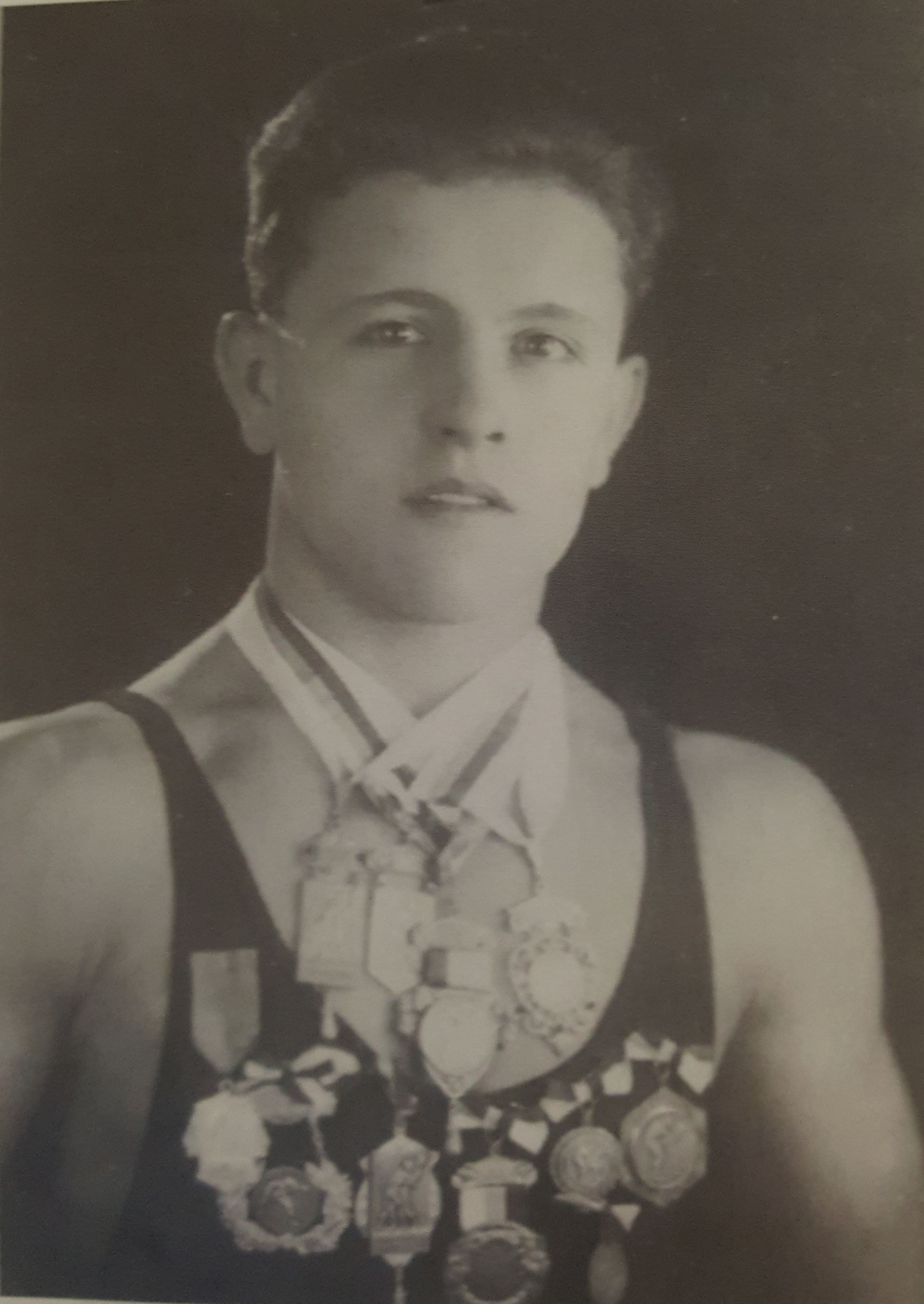 Jindřich Maudr, stříbrný na OH 1928